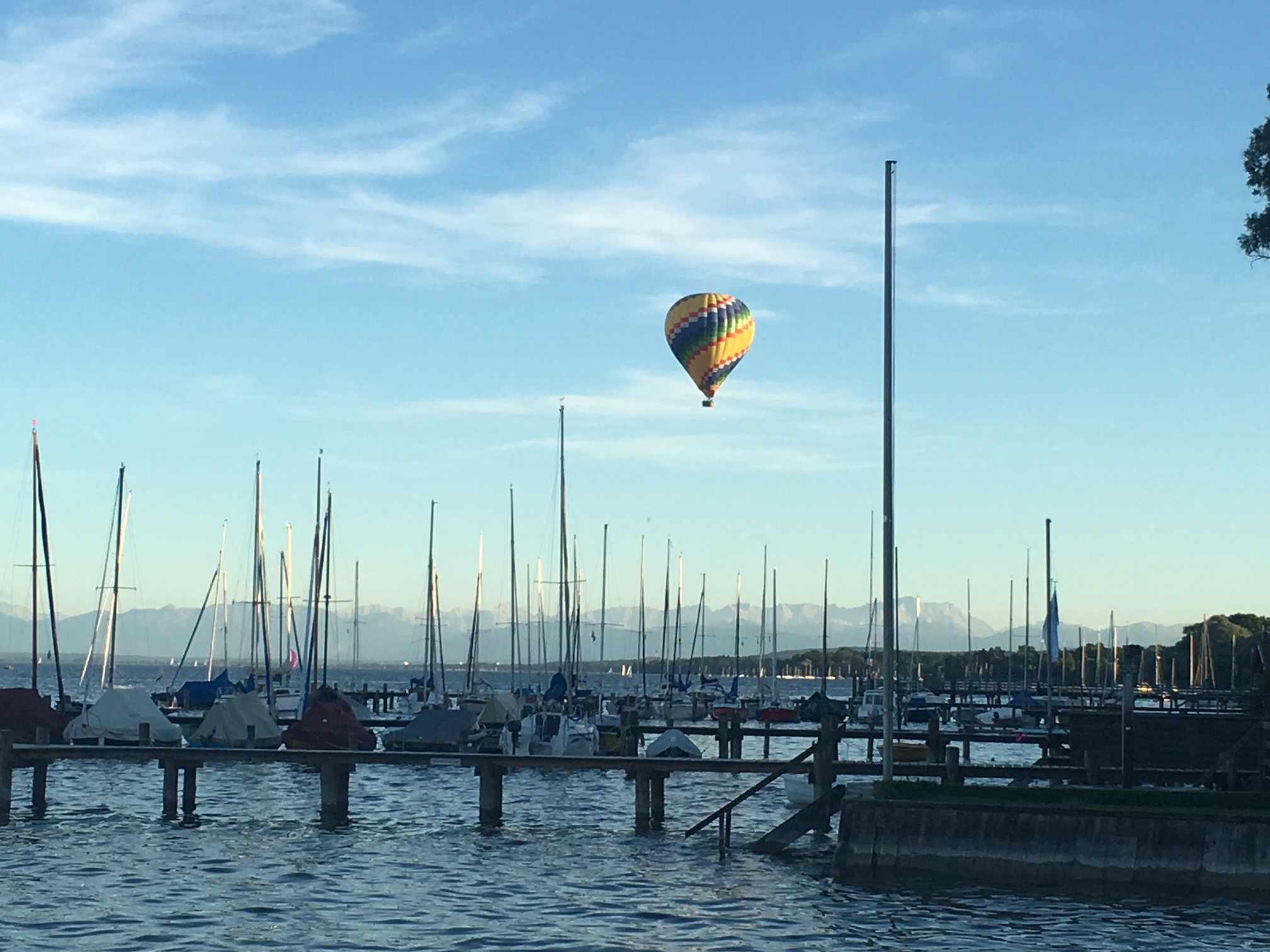 Spätnachmittag am Ammersee